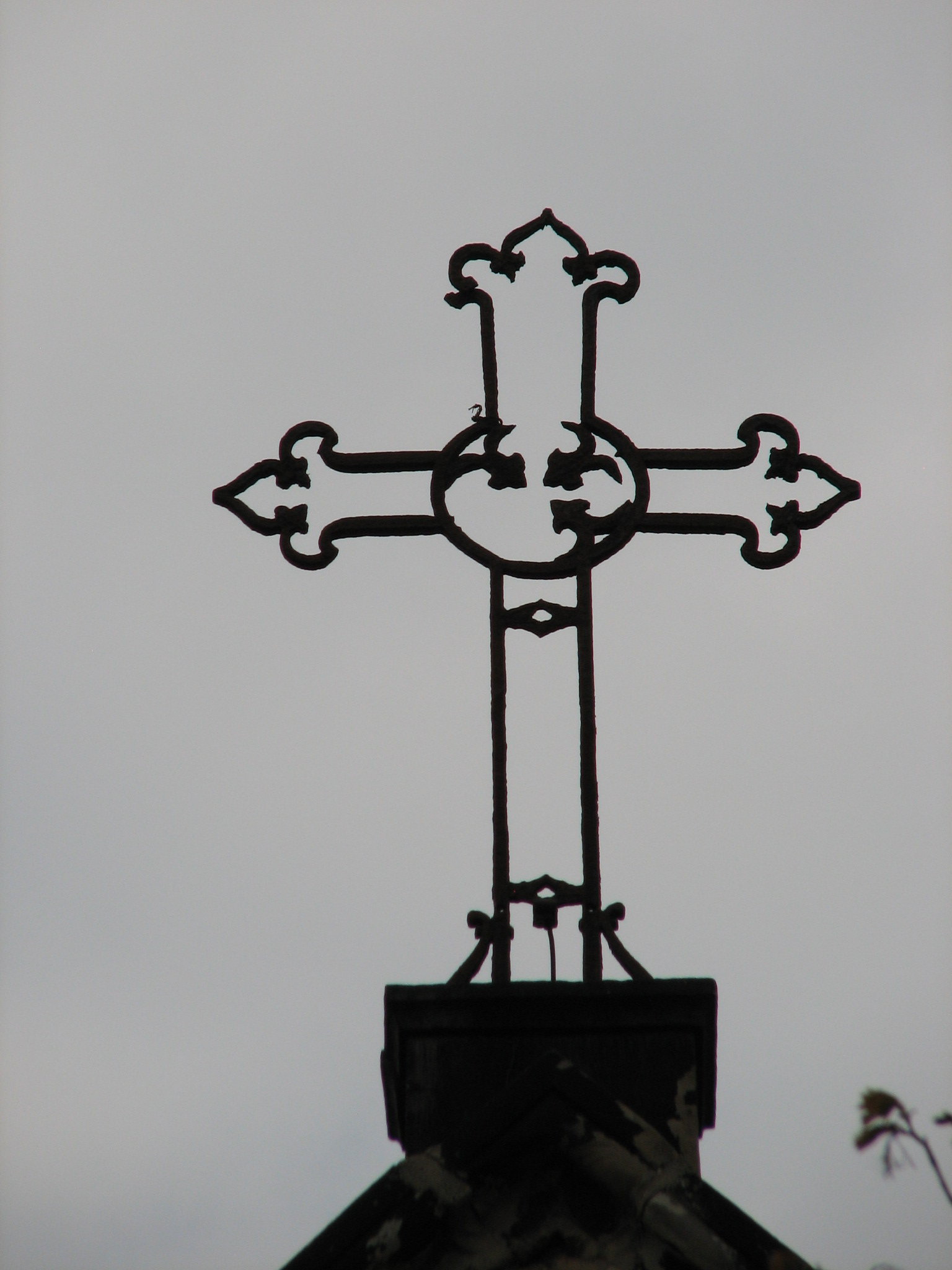 Kirche zu Leopoldshall, Foto vom April 2019